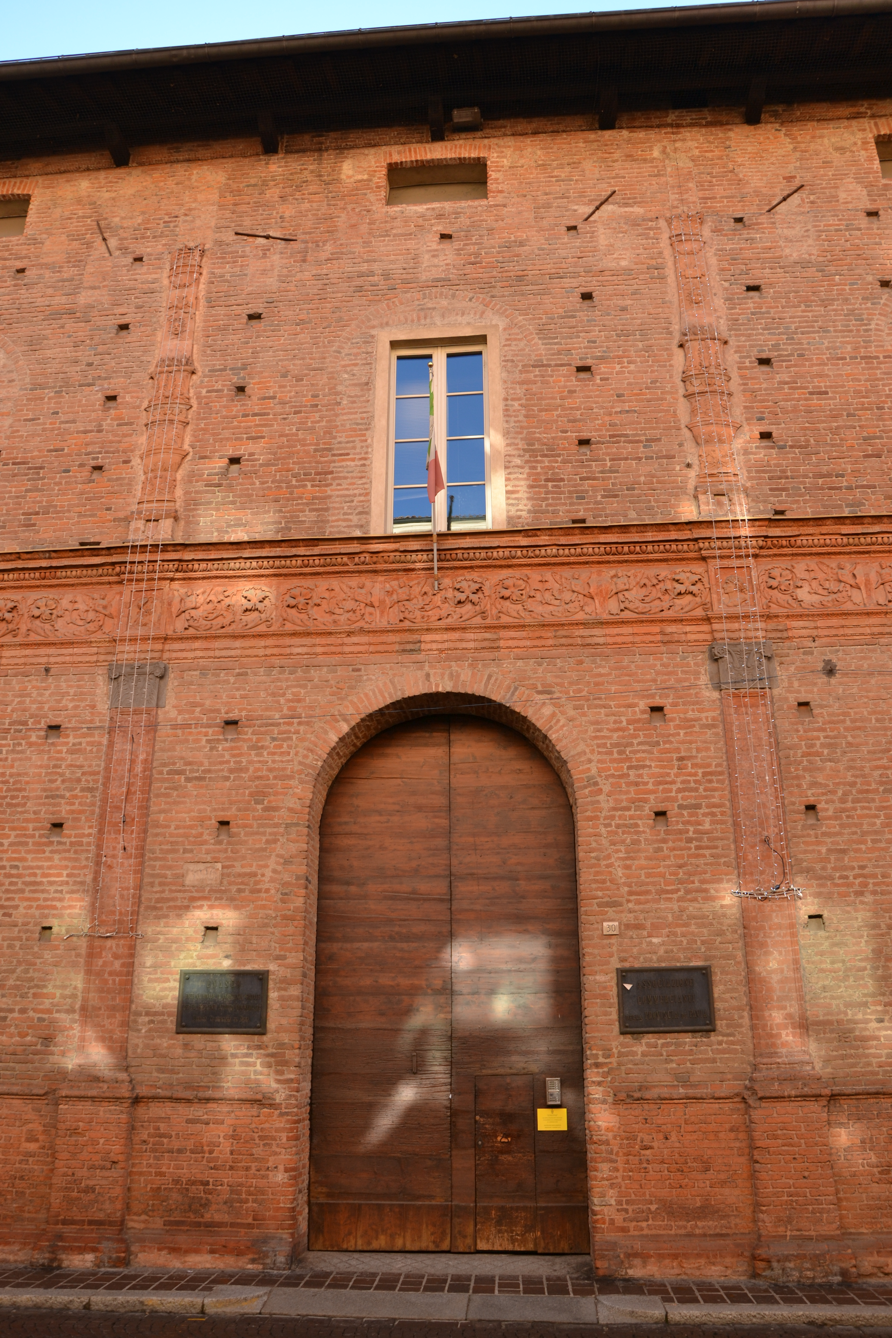 Palazzo risalente al 400, attribuito al Bramante o all'Amadeo. Tipico esempio di architettura rinascimentale lombarda con facciata in laterizio con ricche decorazioni in cotto intorno alle finestre, nella fascia marcapiano e nelle lesene d'angolo, nei capitelli in pietra e nelle candelabre.